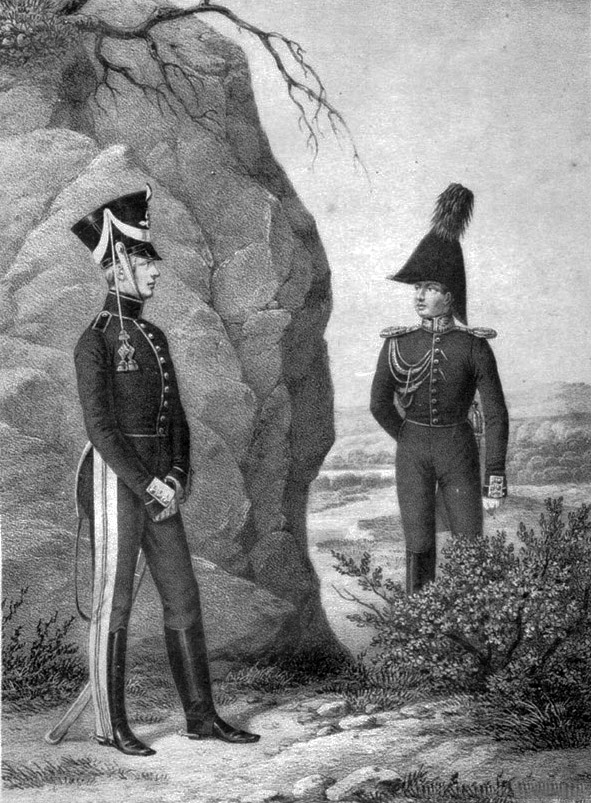 Кадет и Обер-Офицер Гаапаньемского Топографического Корпуса, 1817-1819.